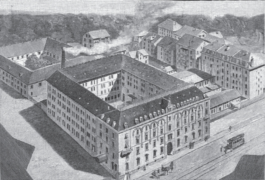 Verlagsgebäude der Deutschen Verlags-Anstalt in der Neckarstraße 121–123 in Stuttgart, Zeichnung von Paul Schmohl, 1898. Links hinten: Königsbad.